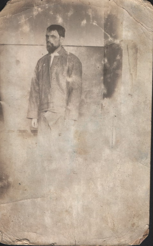 Александр Лбов в тюрьме. г. Вятка. Апрель-май 1908 года